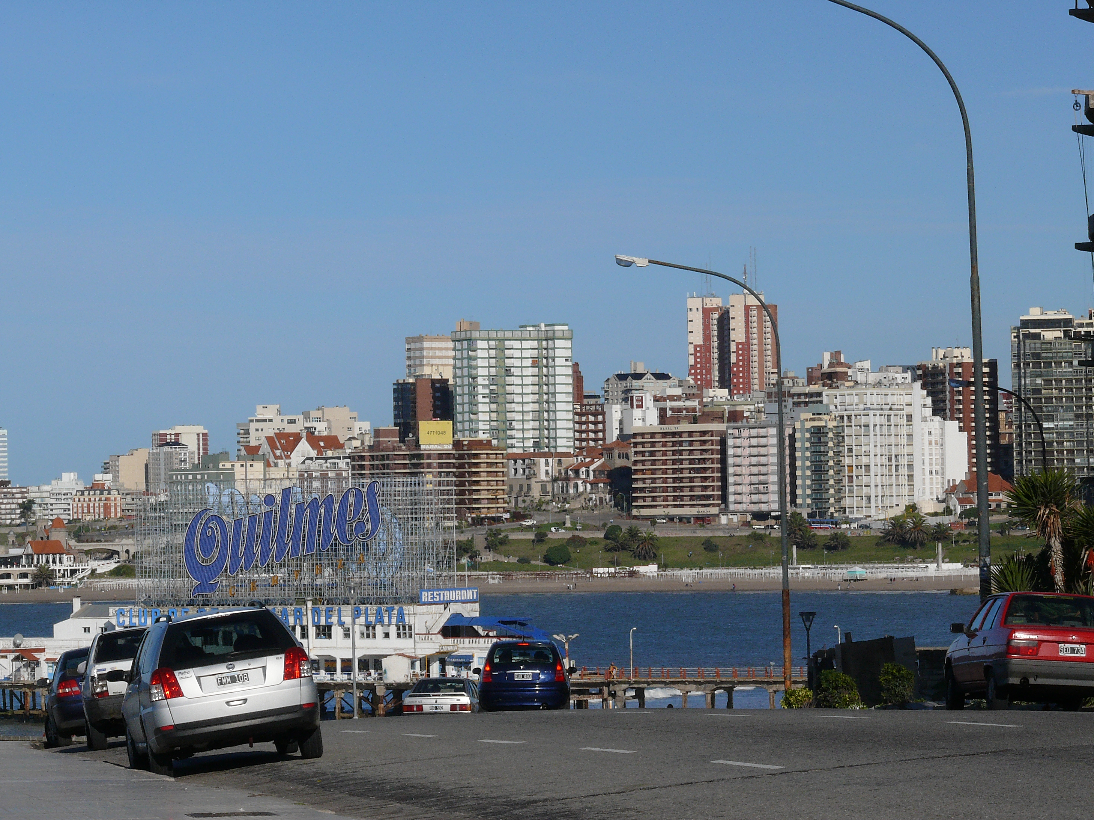 Mar del Plata, Pcia. Bs. as. Argentina.